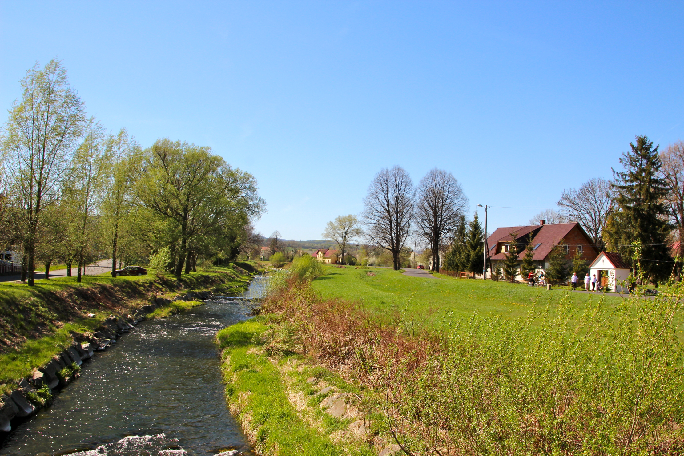 Chomiąża (niem. Komeise) – wieś w Polsce położona w województwie opolskim, w powiecie głubczyckim, w gminie Głubczyce, w gminie Głubczyce.